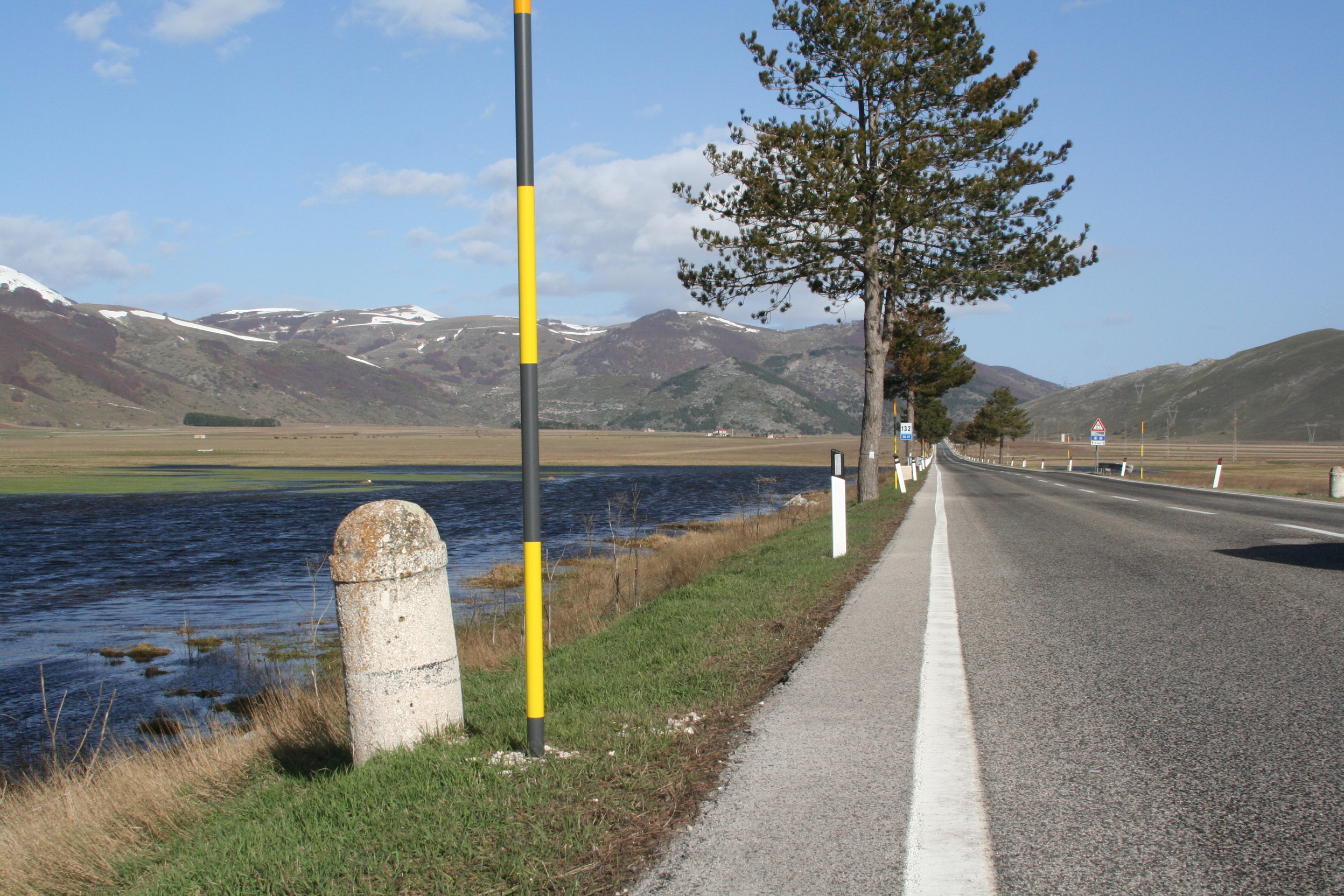 Piana delle cinque miglia